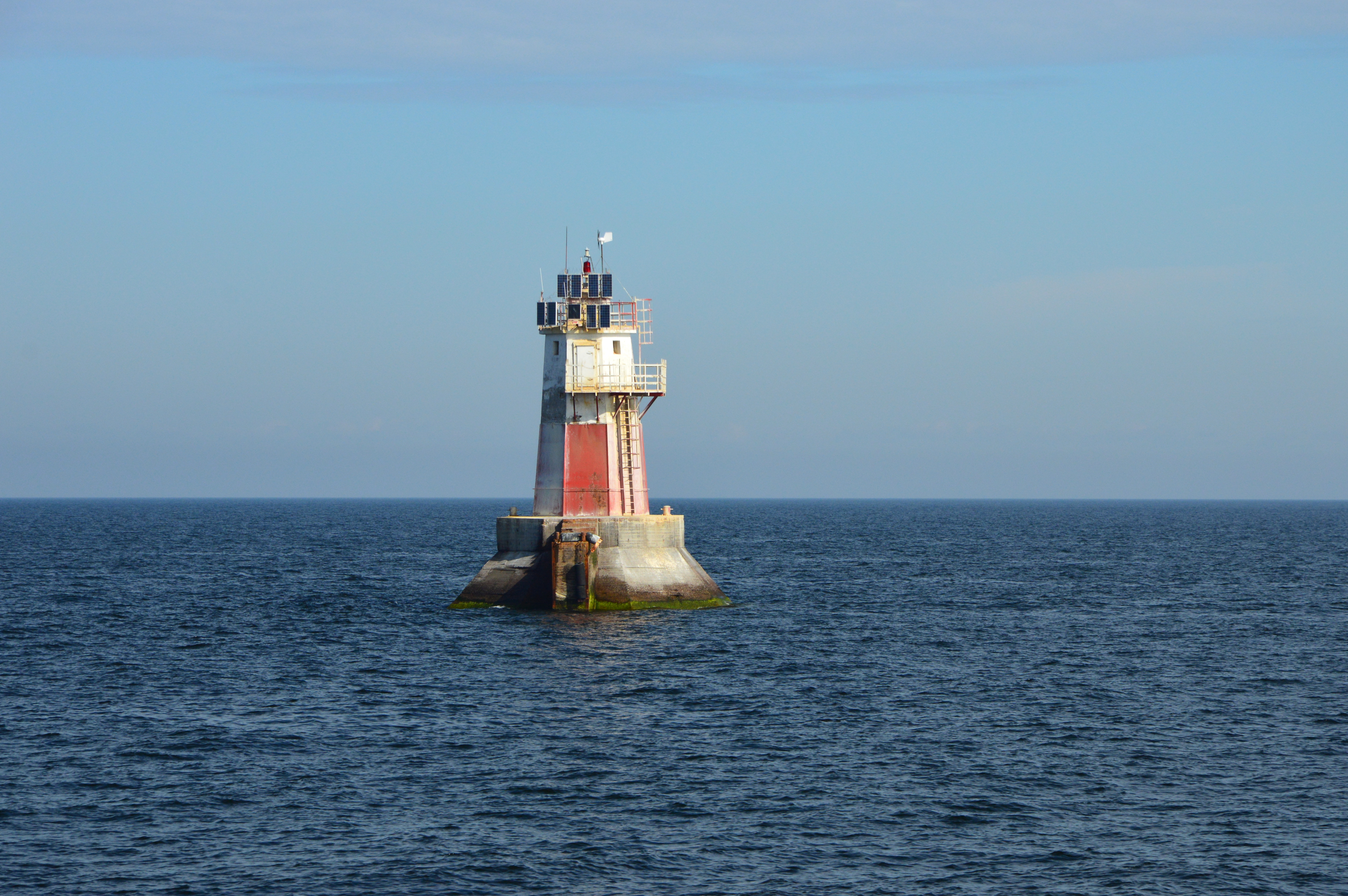 Vahemadala tulepaak